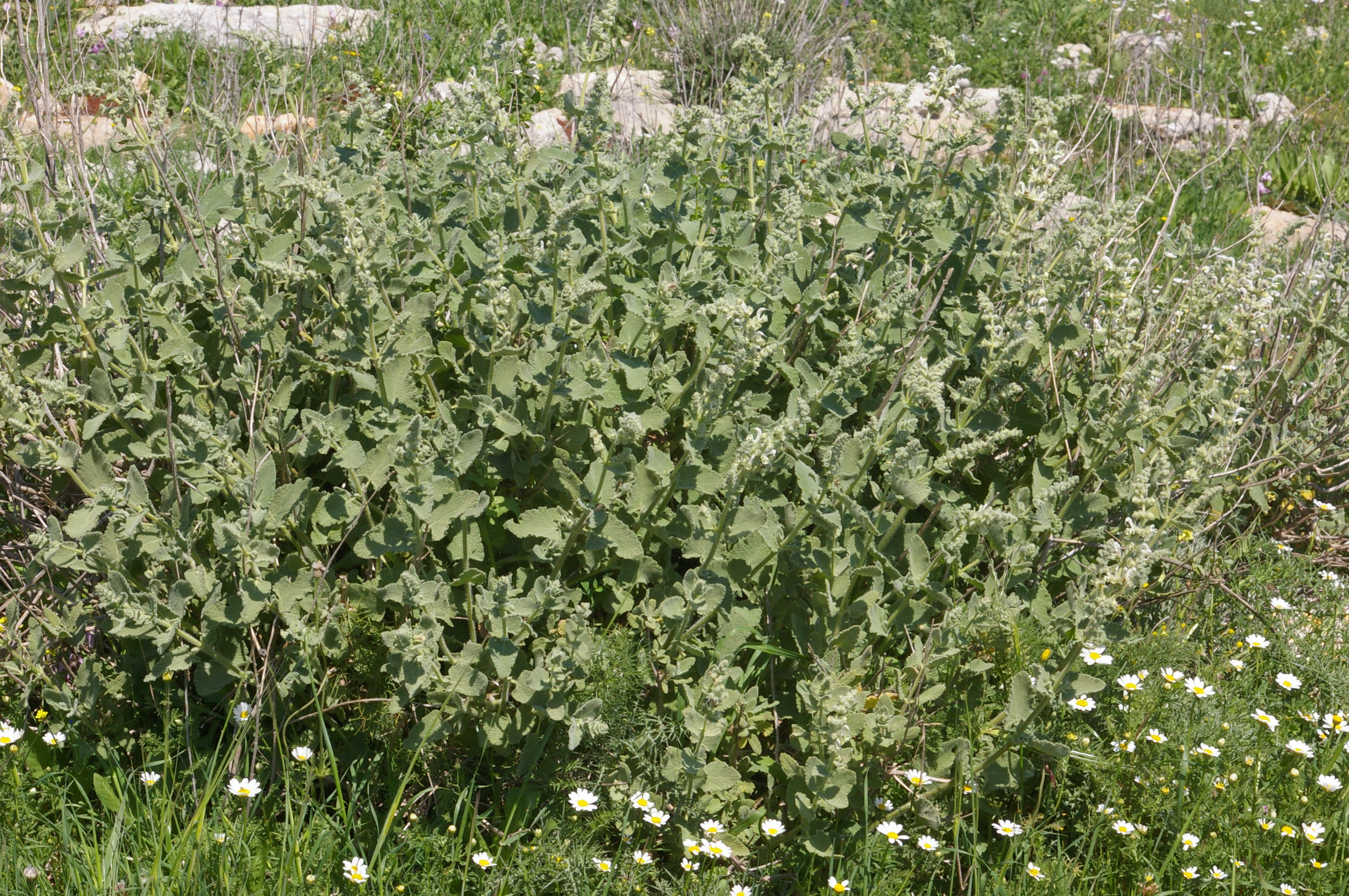 Salvia dominica bush.